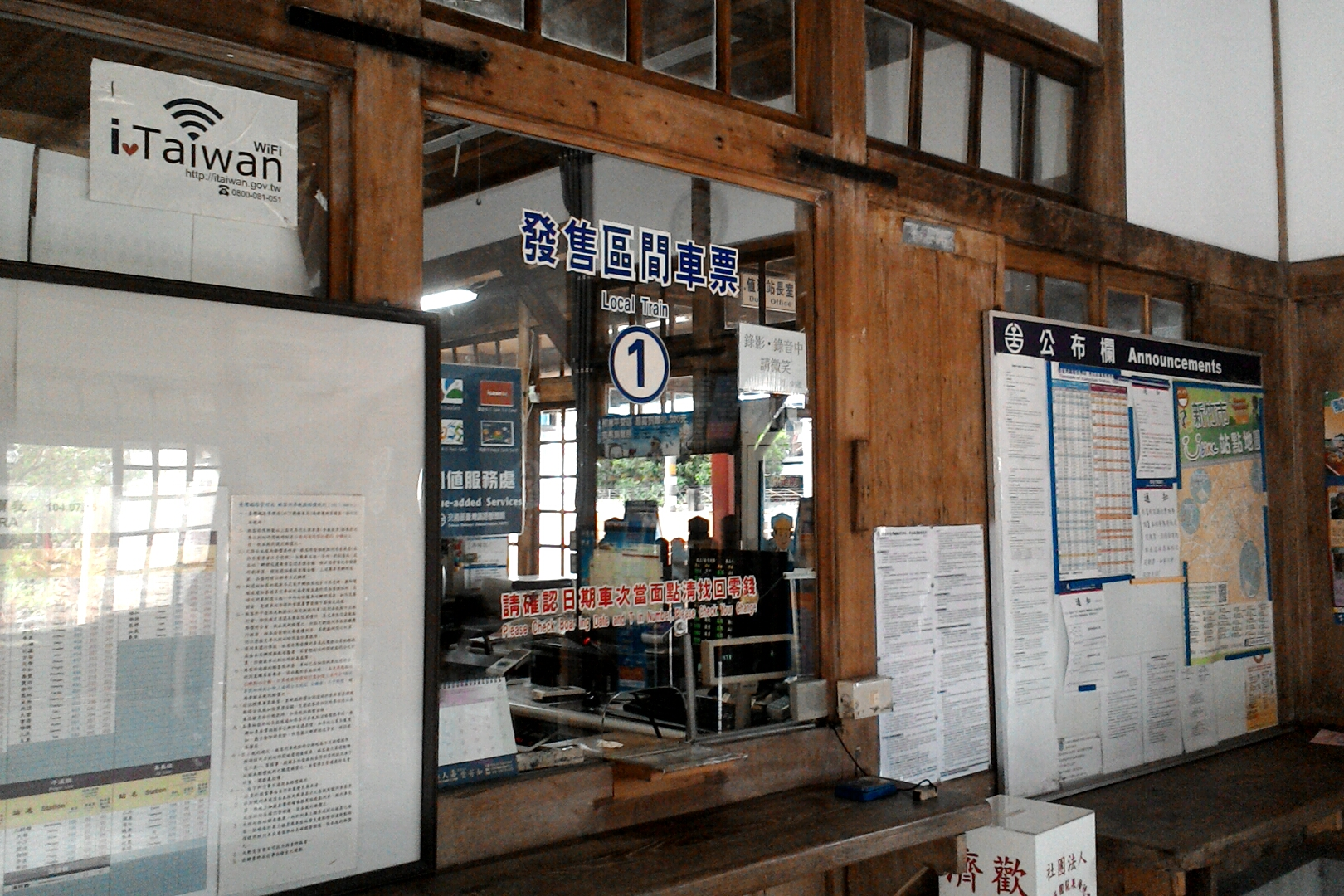 台鐵香山車站售票口,台灣省新竹市香山區香山聯里朝山里